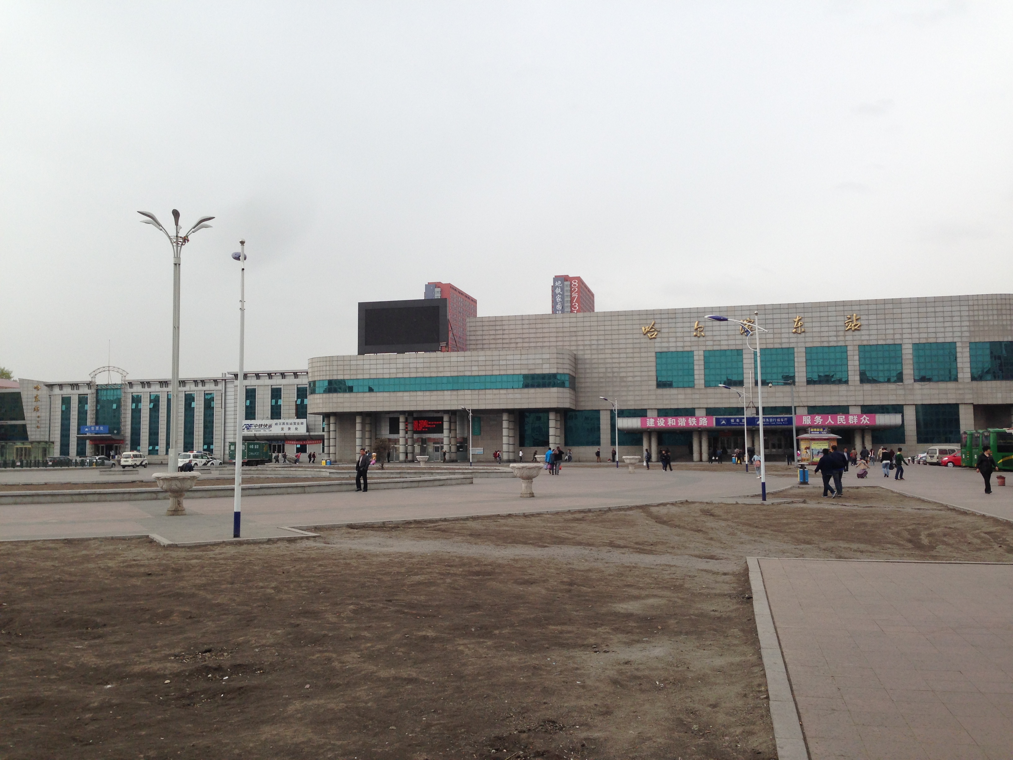 哈尔滨东站